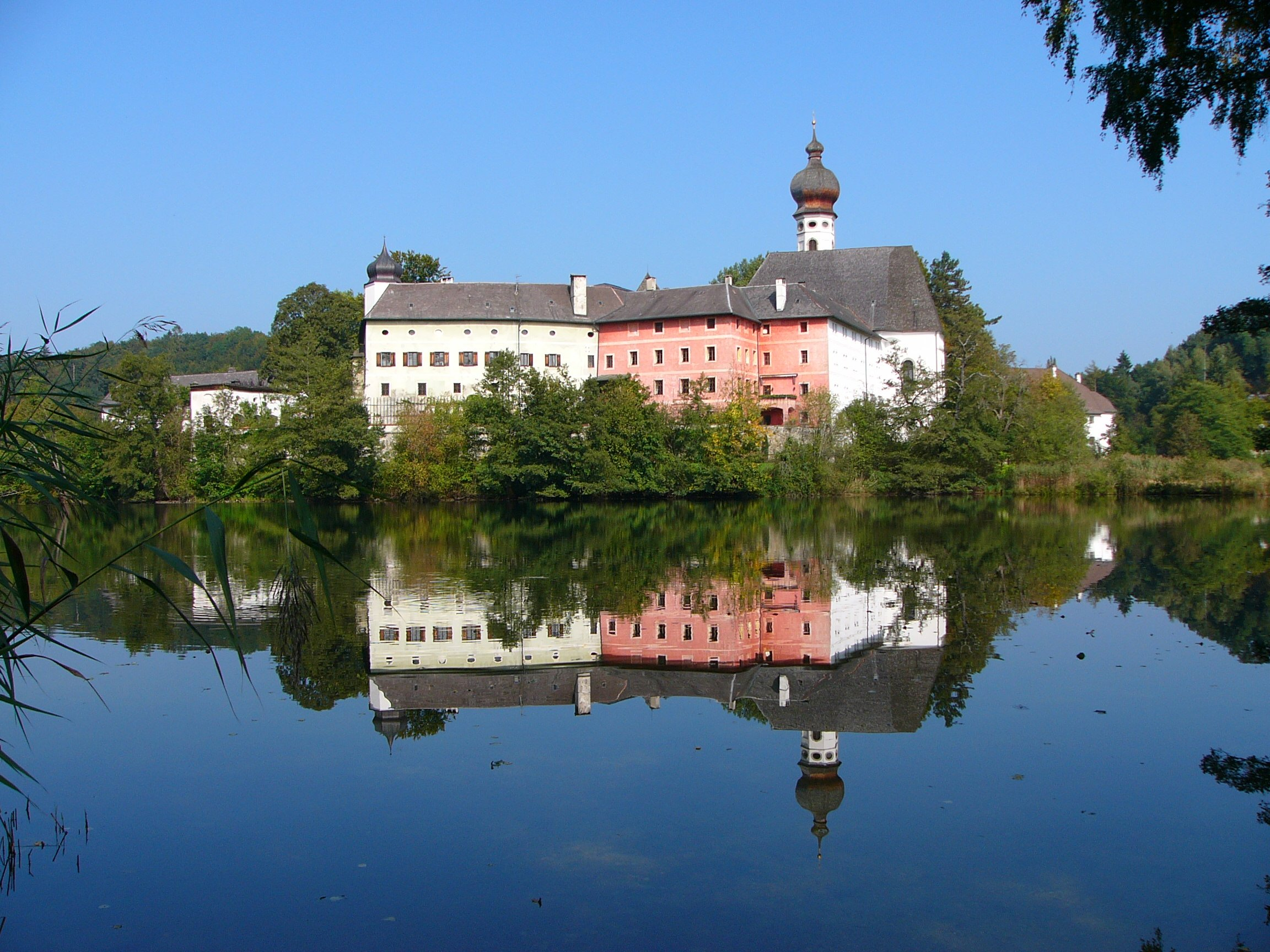 Augustinerchorherrenstift HöglwörthThis is a photograph of an architectural monument.